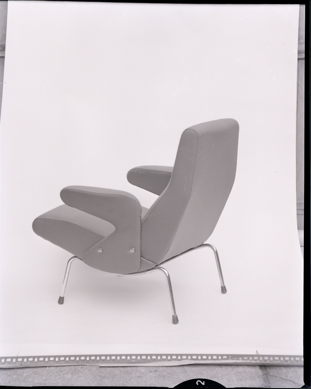 Servizio fotografico : Milano, 1975 / Paolo Monti. - Buste: 4, Fototipi: 4 : Negativo b/n, gelatina bromuro d'argento/ pellicola ; 10x12. - ((Serie costituita da 4 negativi identificati con i nn.: 5353-5356. Sulla busta G5253 manoscritto: "Ar-Flex/ Prove - Catalogo". La suddetta serie è contenuta nella scatola identificata con la numerazione G5253-5391. Sul coperchio della scatola manoscritto: "Ar-Flex". - Fonte: Rubrica di Paolo Monti: Archivio 10x12 (ultimi numerati) - dal G1 al (s.d.), presso Archivio Paolo Monti